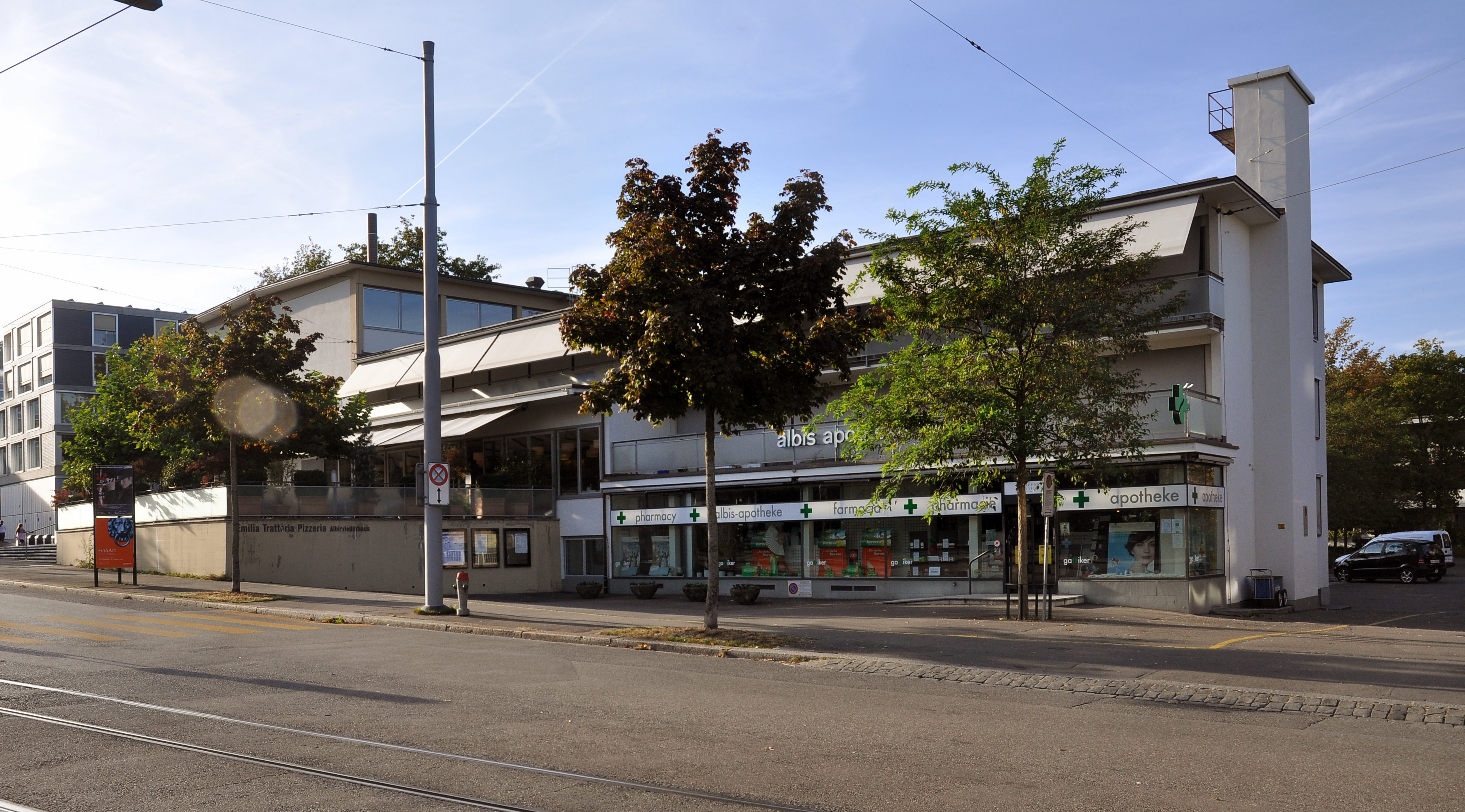 Albisriederhaus, Zürich Ausführung 1934-35 Architekt: Karl Egender mit Wilhelm Müller